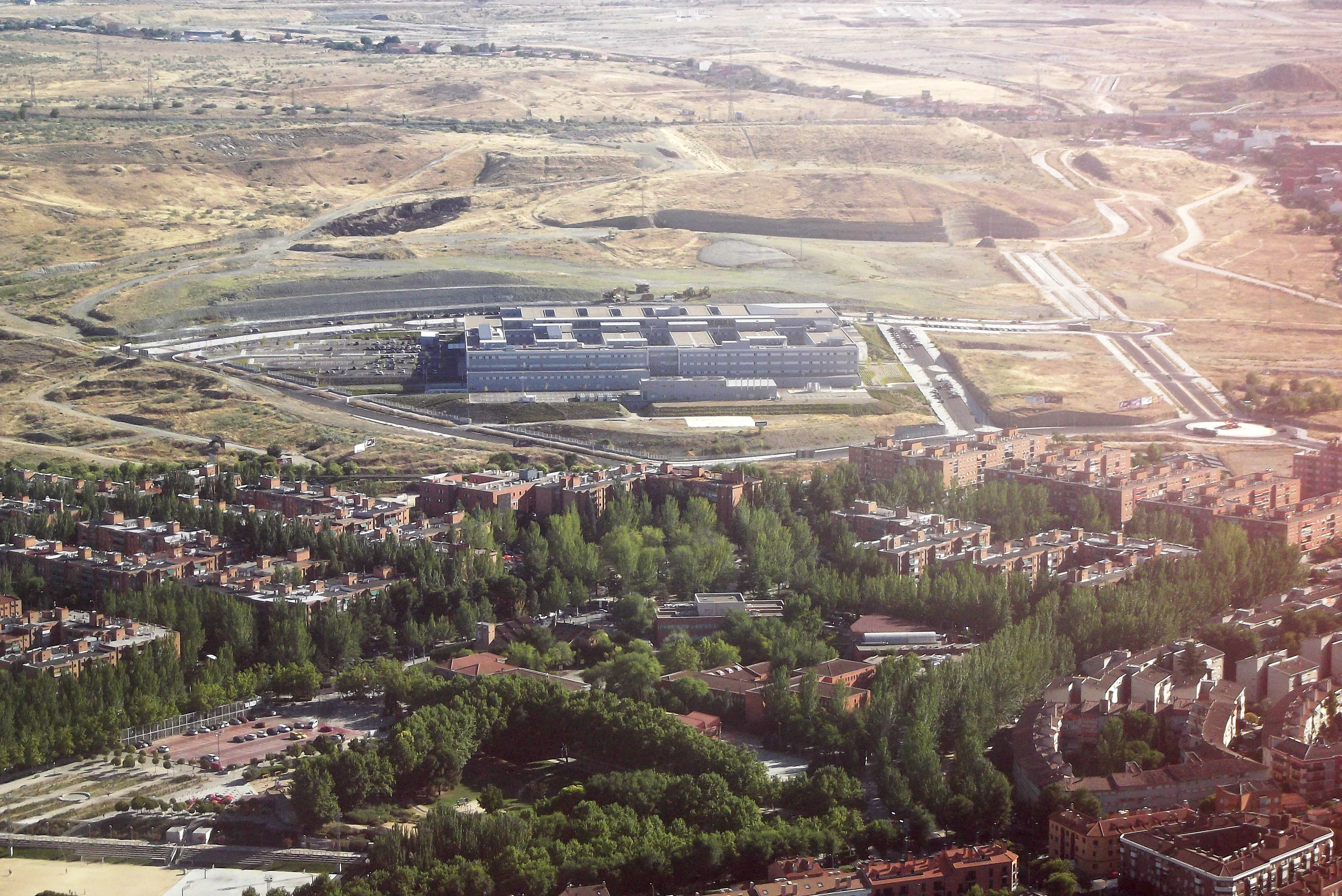 Hospital del Henares (San Fernando de Henares) desde el aire.